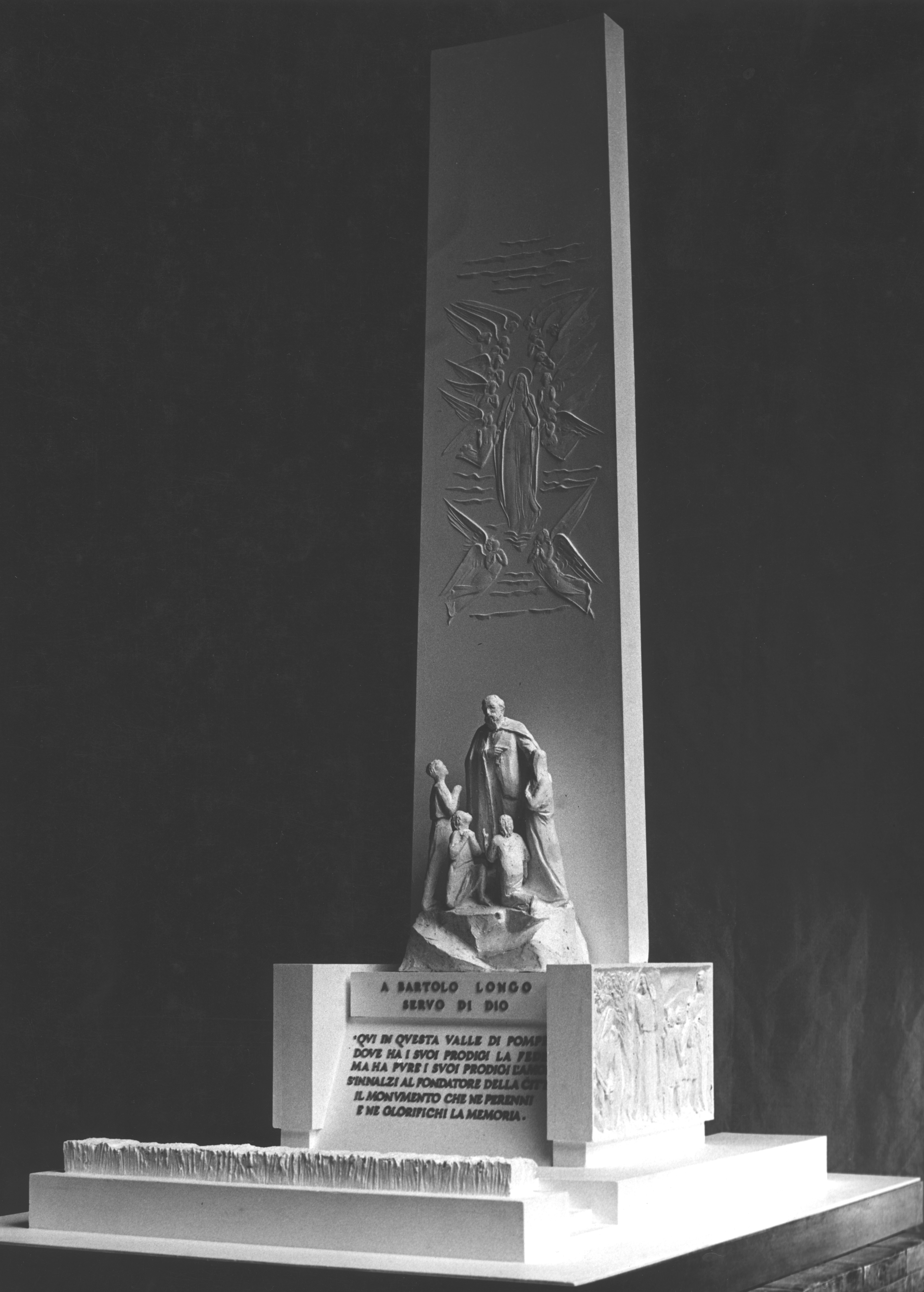 Bozzetto del Monumento commemorativo di Bartolo Longo, sito nella piazza del Santuario di Pompei